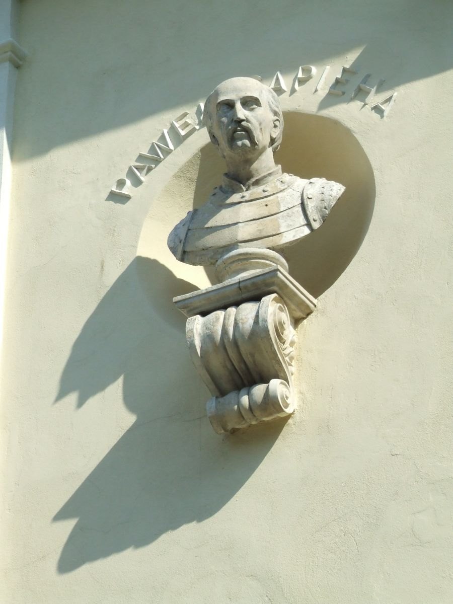 Pałac Juliana Ursyna Niemcewicza, obecnie rektorat SGGW, popiersie Pawła Jana Sapiehy na elewacji pałacu